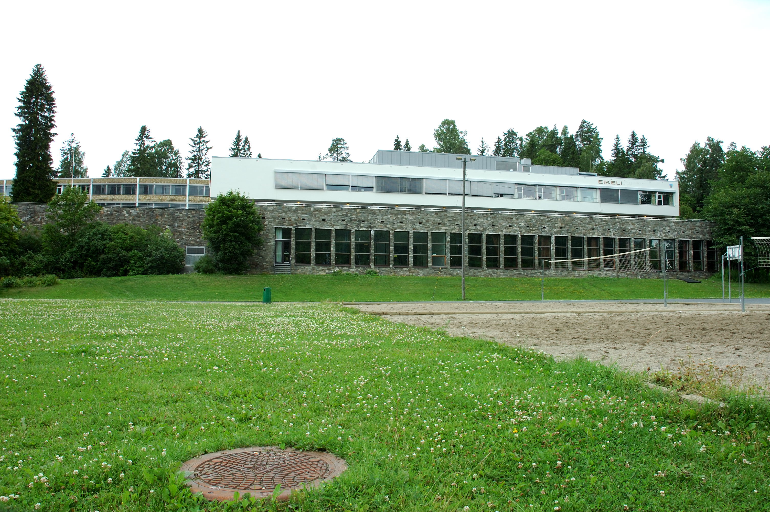 Eikeli vidregående skole